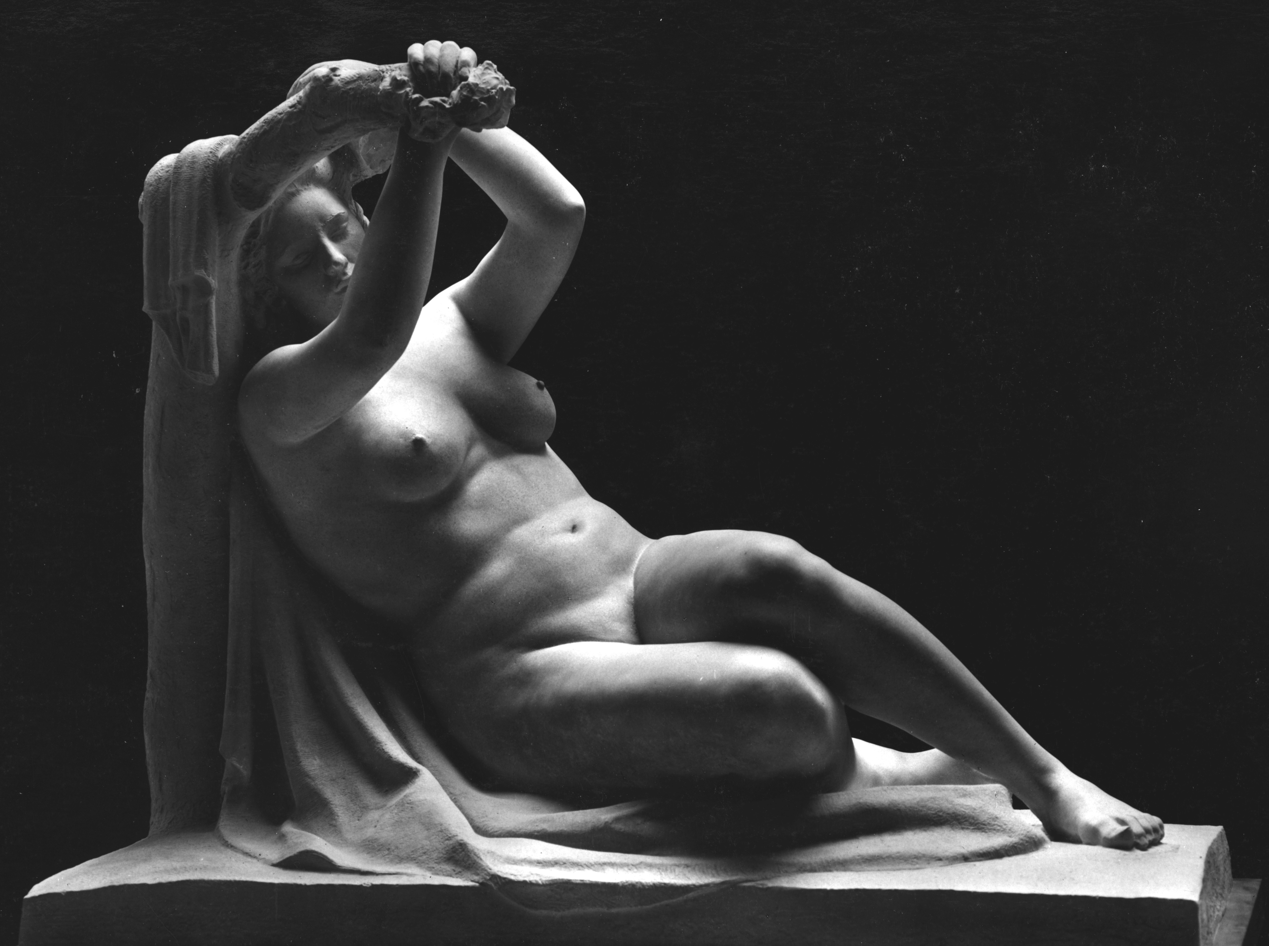 Rappresentazione della quiete dopo la tempesta